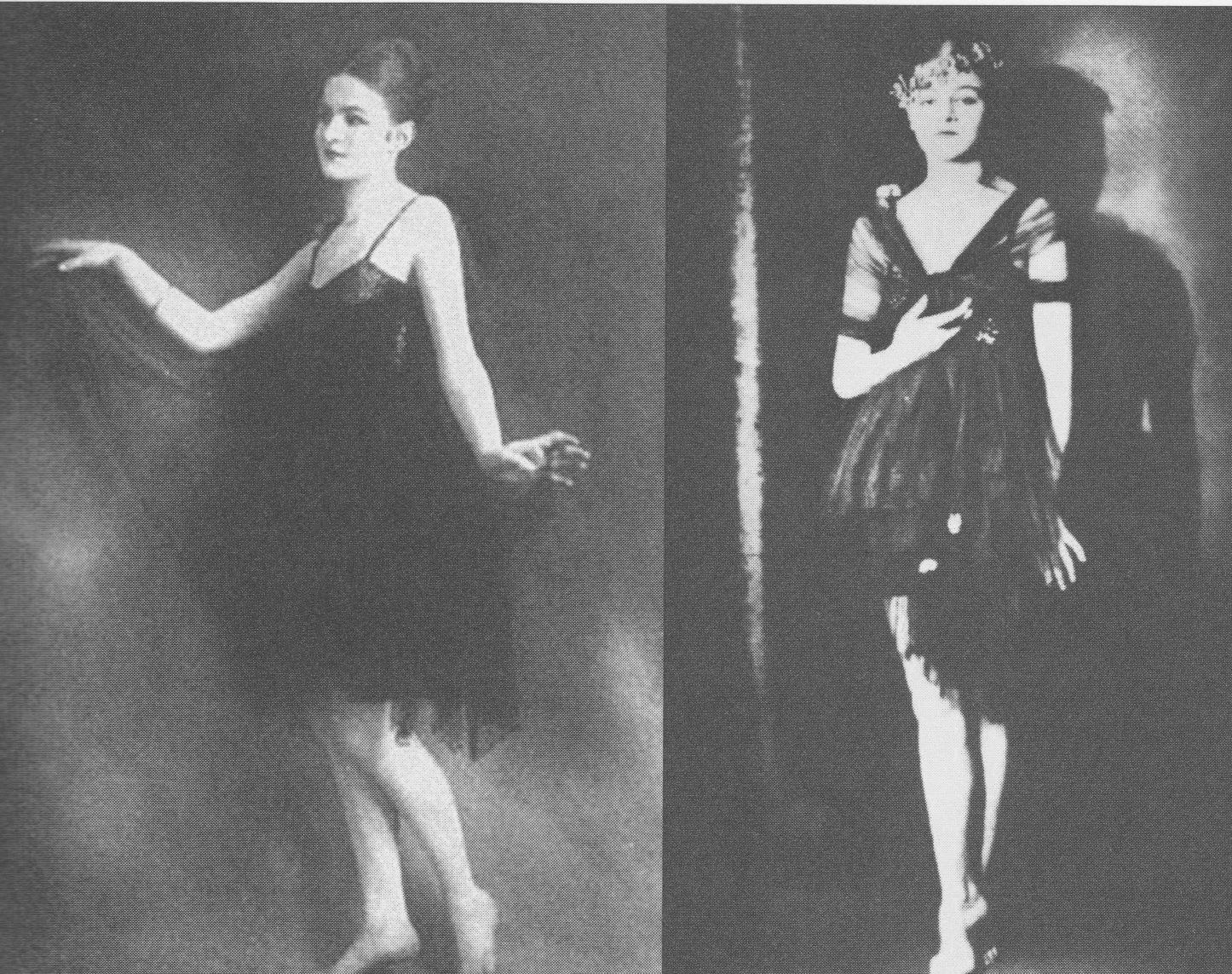 Anita Berber.